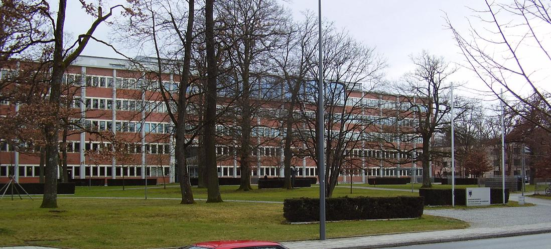 Dienstgebäude in der Cincinattistraße des Deutschen Patent- und Markenamts in München. Das Gebäude ist das frühere Bundeswehrkrankenhaus München.